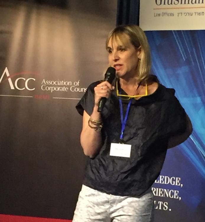 נטע גל-עצמון מרצה בכנס השנתי של פורום הנשים של ארגון היועצות המשפטיות. "נשים מובילות ומצליחות מספרות את סיפורן"